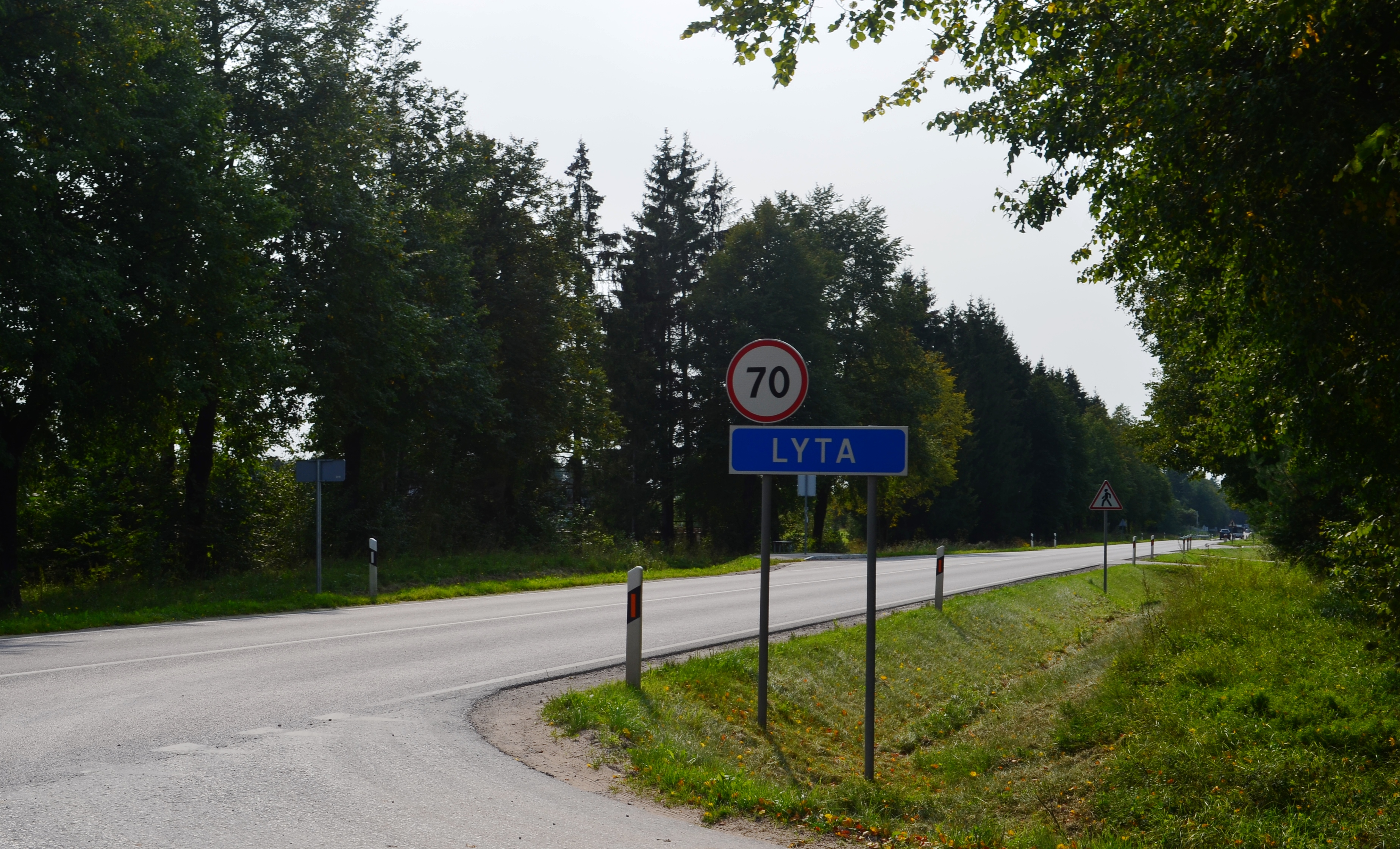 Lyta, Mickūnų sen., Vilniaus raj.